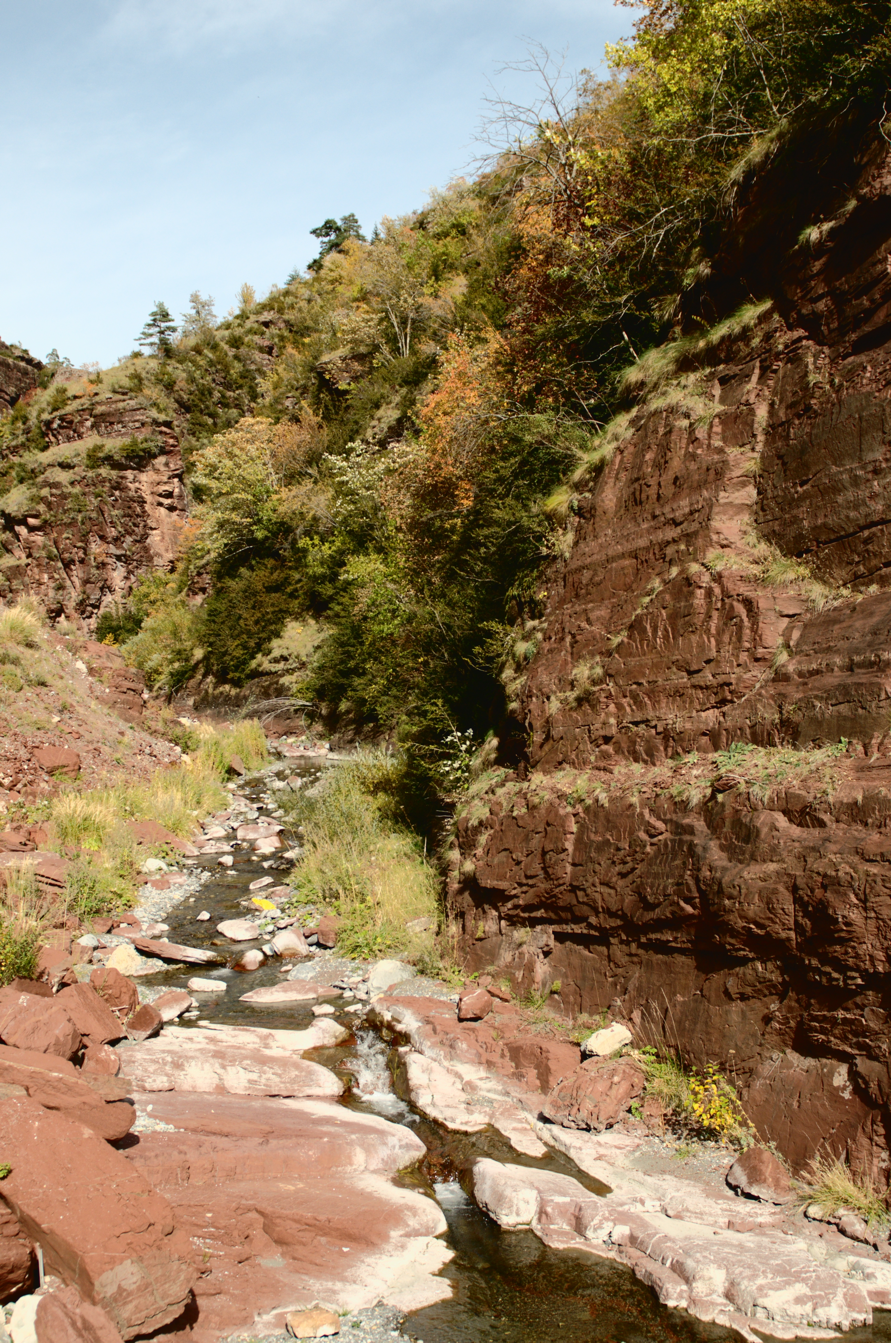 Gorges du Cians